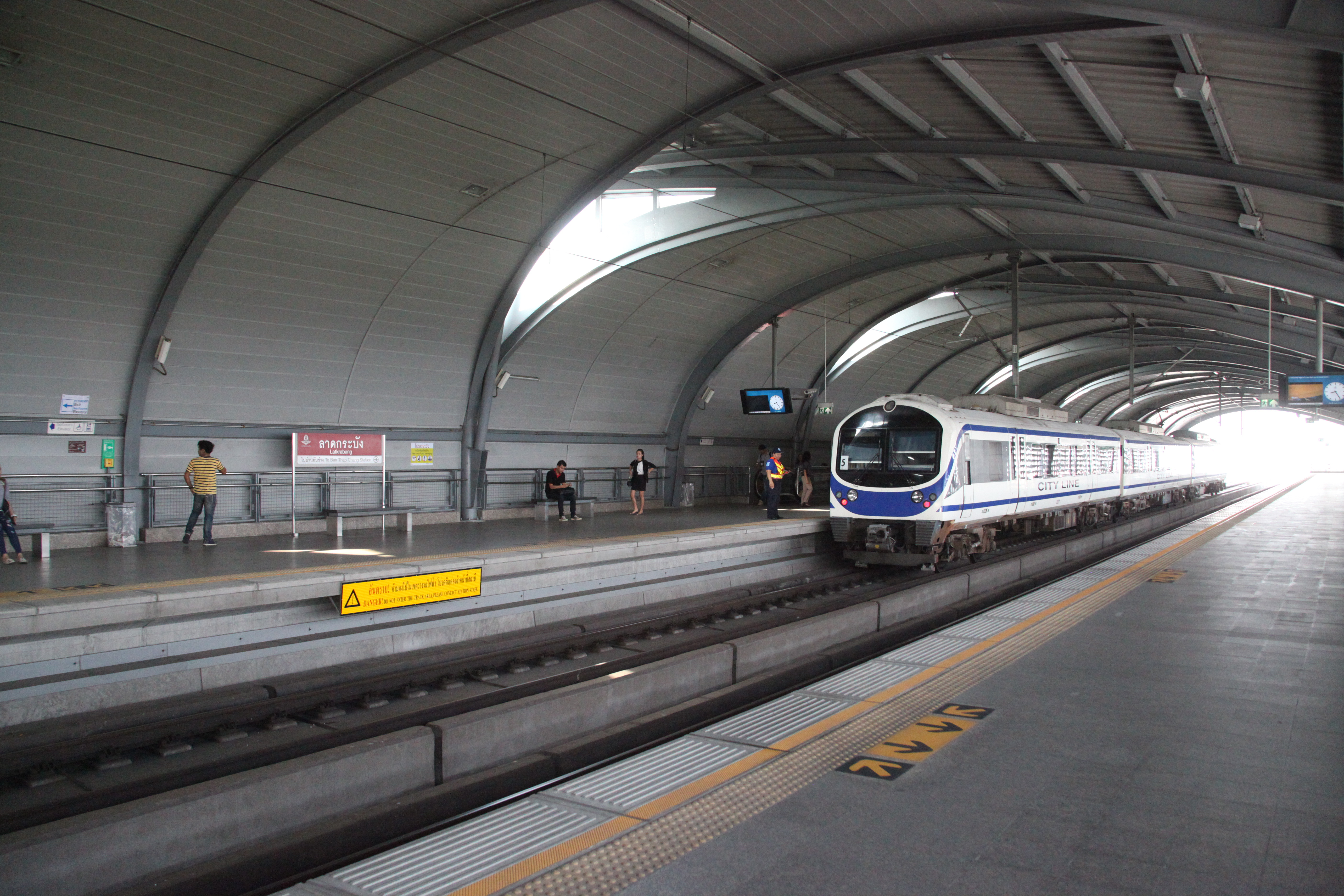 ラートクラバン駅